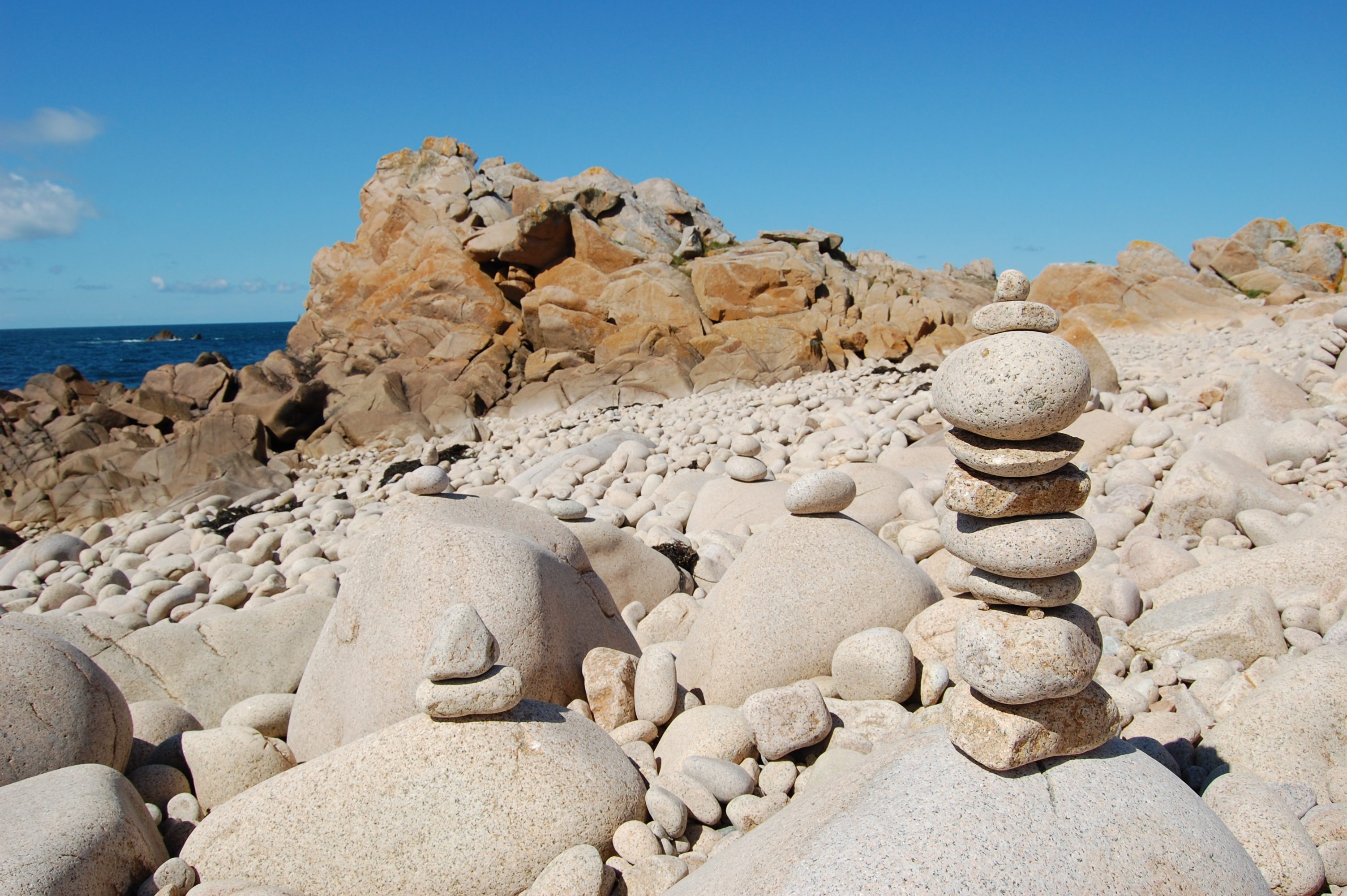 Monticule laissé par des touristes, sur la pointe du Diben.